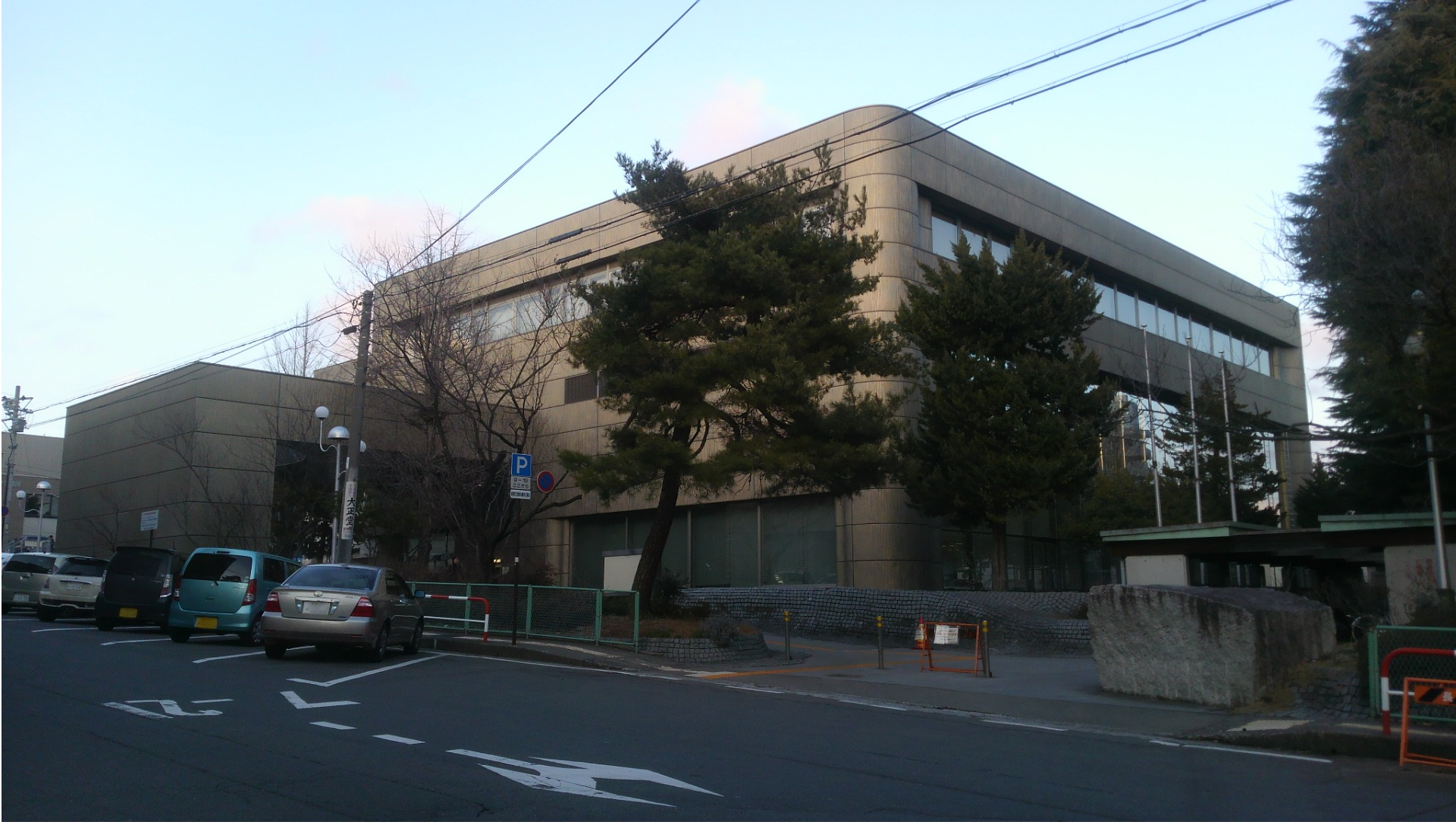 長野市立図書館 長野図書館（ナンバープレート等レタッチ）長野県長野市大字長野長門町1097-3